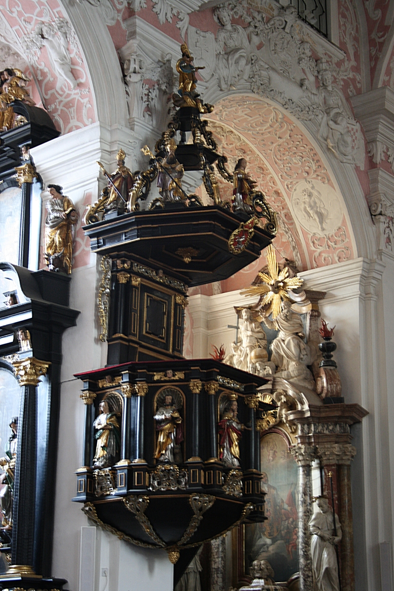 RKT Akademska crkva sv. Katarine. Uz kapelu svetog Ignacija Lojolskoga je barokna propovjedaonica iz godine 1690., dar zagrebačkog biskupa Aleksandra Mikulića. Na vrhu baldahina je kip Pape Lava Velikoga, koji svojim riječima satire Atilu - "Bič Božji". Gornji kipovi predstavljaju velike svete crkvene učitelje - govornike: Augustina, Ambrozija, Karla i sv. Moniku; a donji uz Krista, četiri evanđelista: Ivana, Marka, Mateja i Luku.